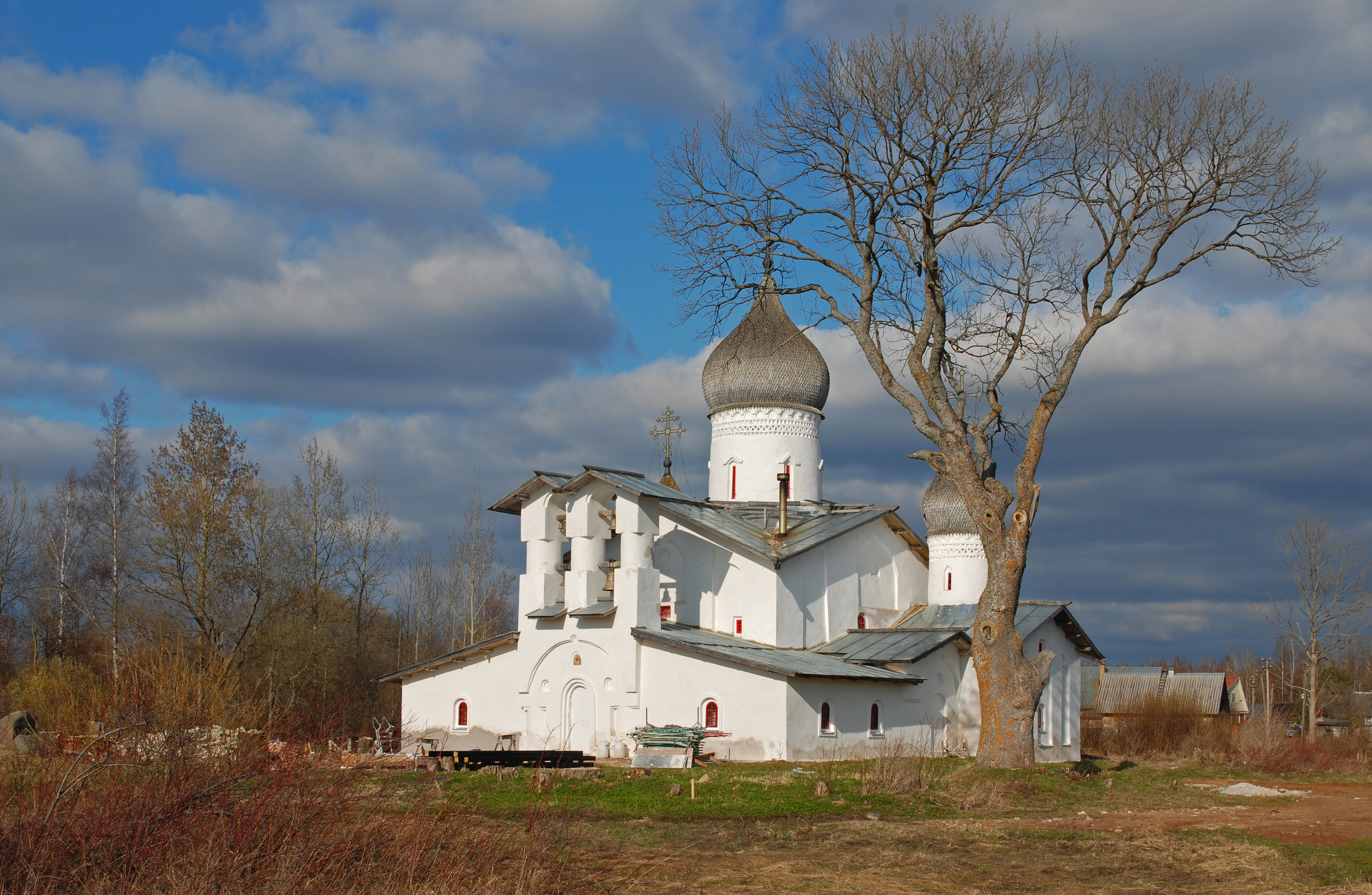 Церковь Троицы (Псковская область, Гдовский район, село Доможирка)